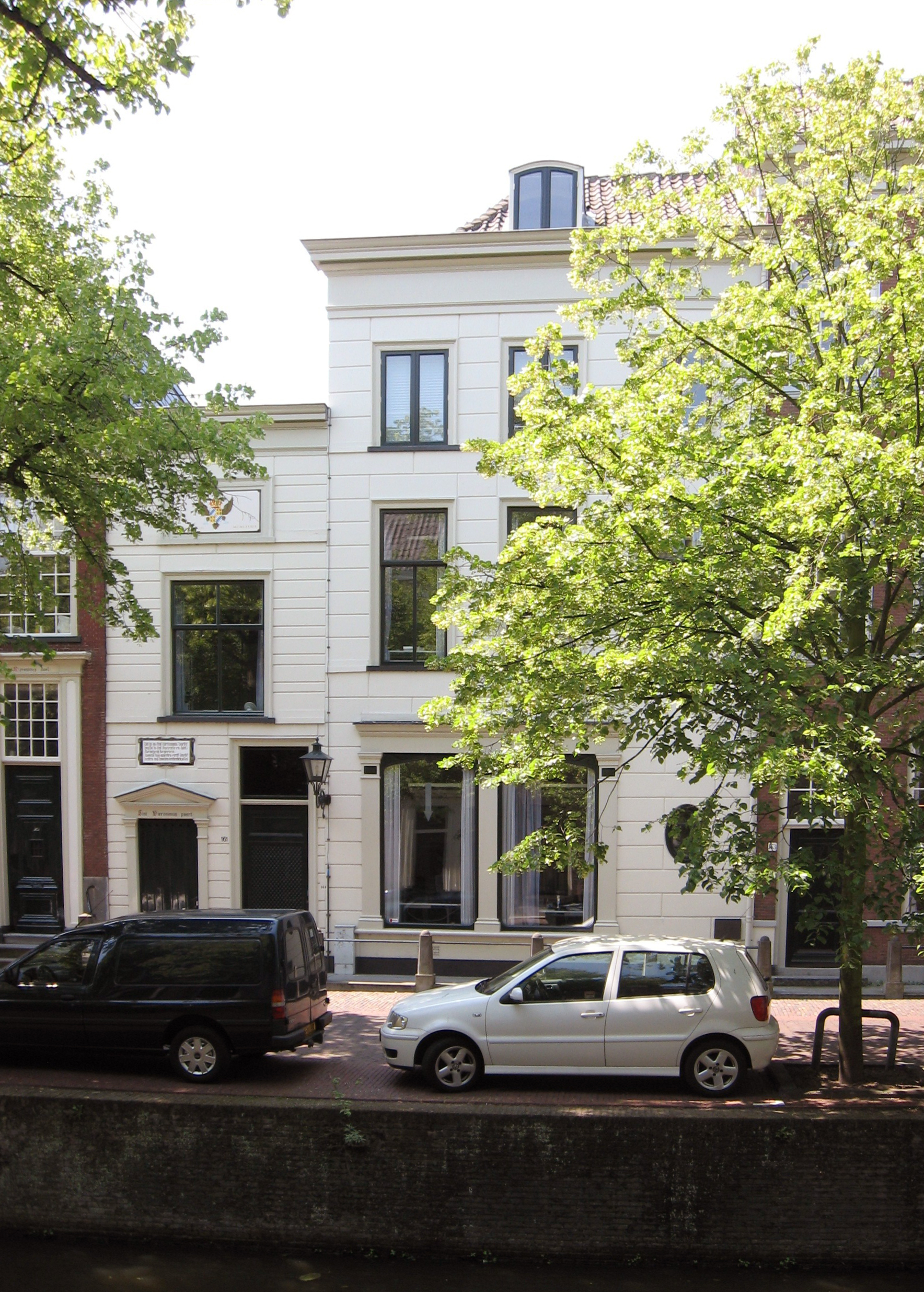 Delft - Oude Delft 161.jpg, rijksmonument